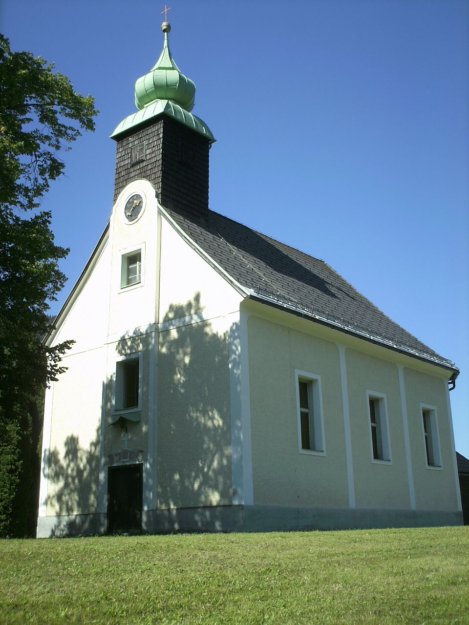 Kath. Filialkirche hl. Barbara in Gollrad-Gußwerk/Österreich.